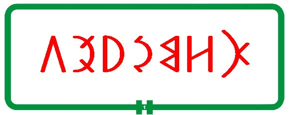 Örményes község neve székely-magyar rovással